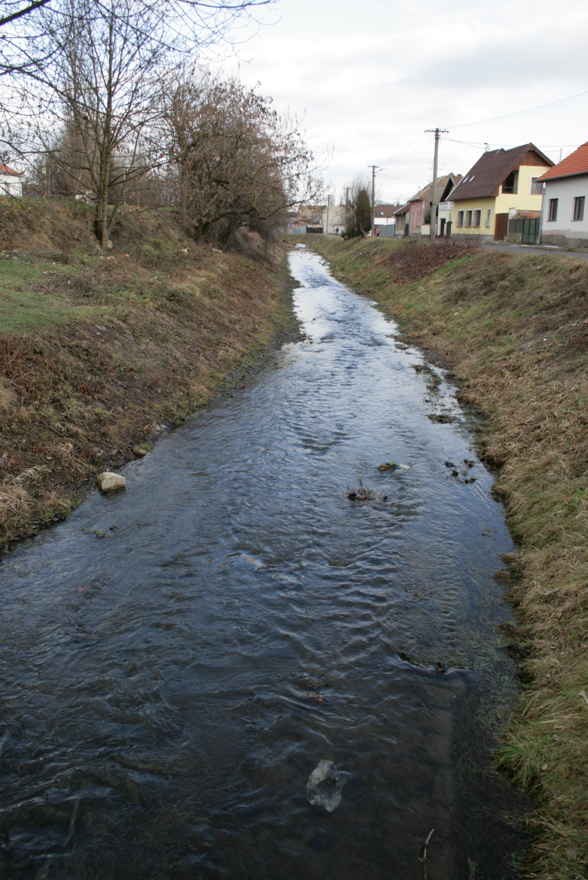 Tuhársky potok pretekajúci južnou časťou Lučenca smerom na východ.